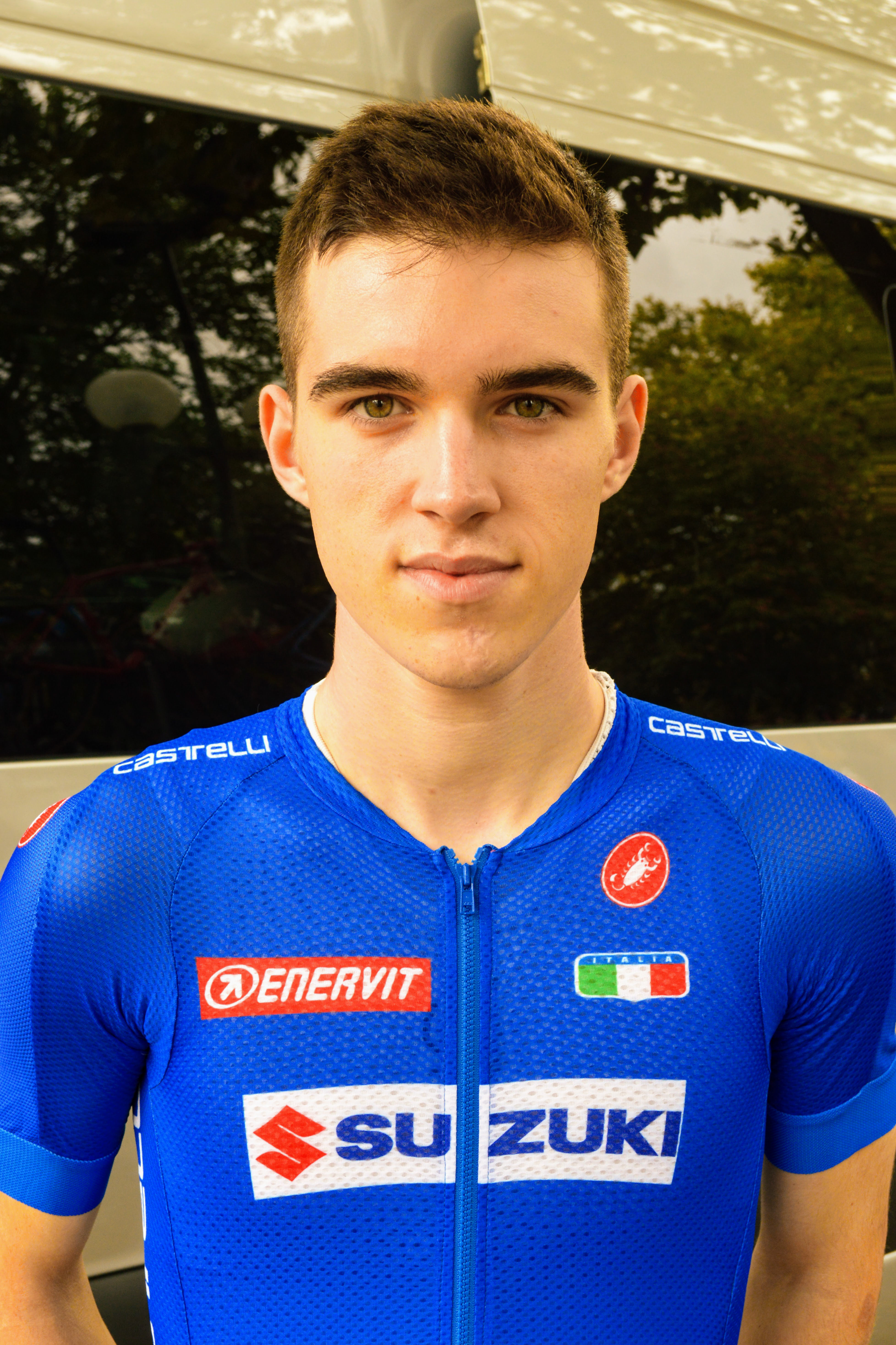 Giovanni ALEOTTI - Août 2019